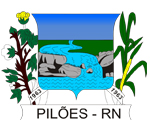 Brasão de Pilões, estado do Rio Grande do Norte, Brasil.